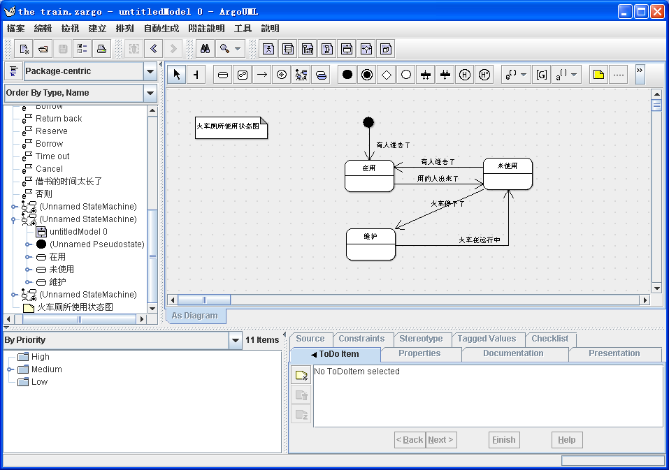 这是用于词条『ArgoUML』的。